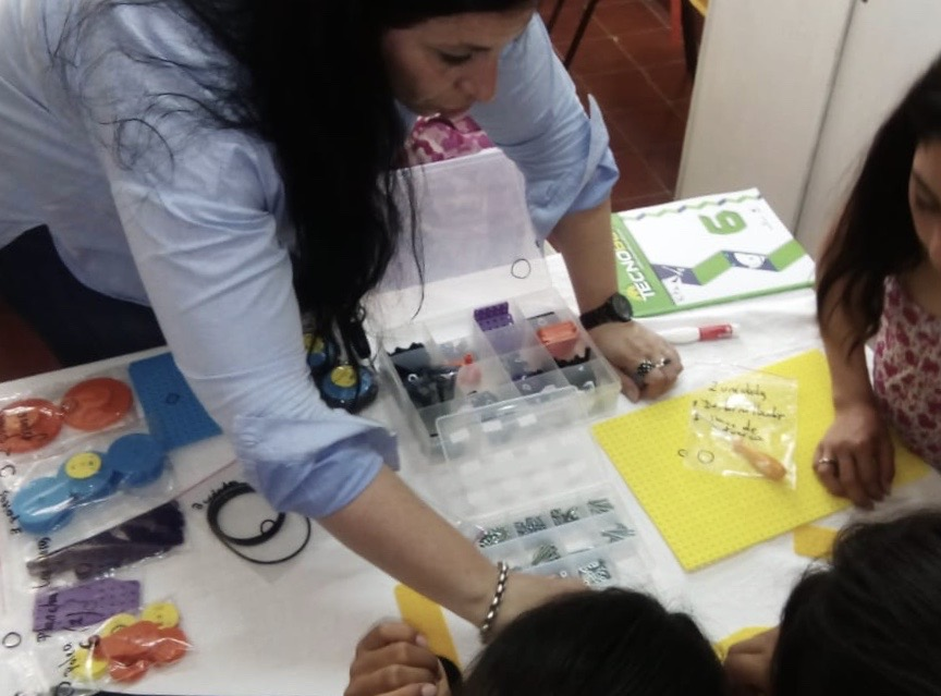 El uso de la Robótica en las escuelas fomenta nuevos aprendizajes que potencia el desarrollo de nuevas habilidades y competencias en los alumnos. El Plan Provincial de Robótica Educativa es una propuesta pedagógica innovadora e integral que tiene como objetivos: el acceso, la inclusión y la educación digital; potenciar los aprendizajes y contenidos curriculares; y el desarrollo de habilidades y competencias necesarias para la inserción plena en la sociedad del conocimiento.